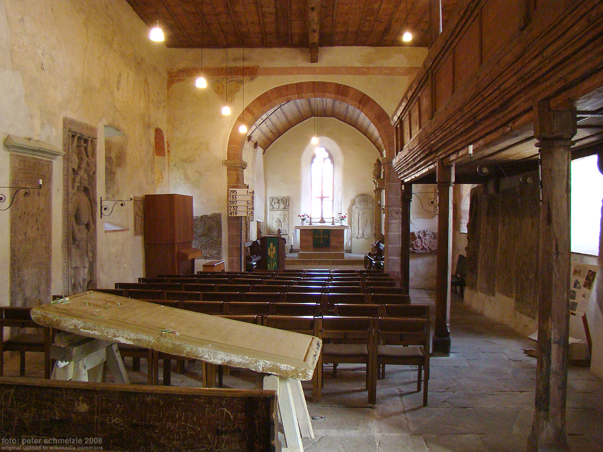 Innenansicht der Totenkirche Neckarbischofsheim